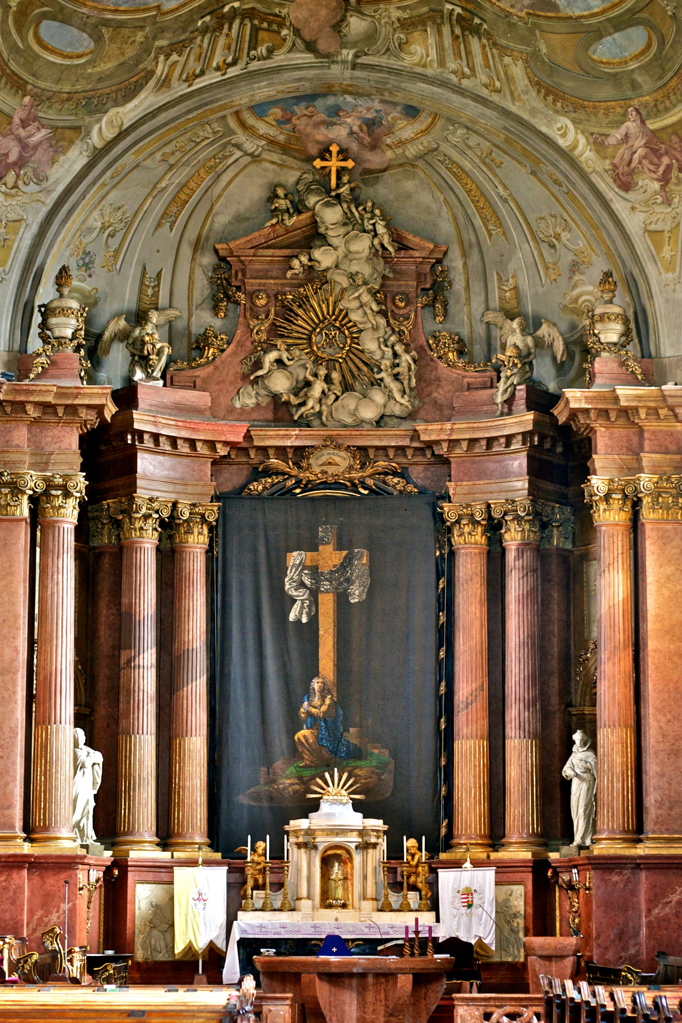 Székesfehérvár